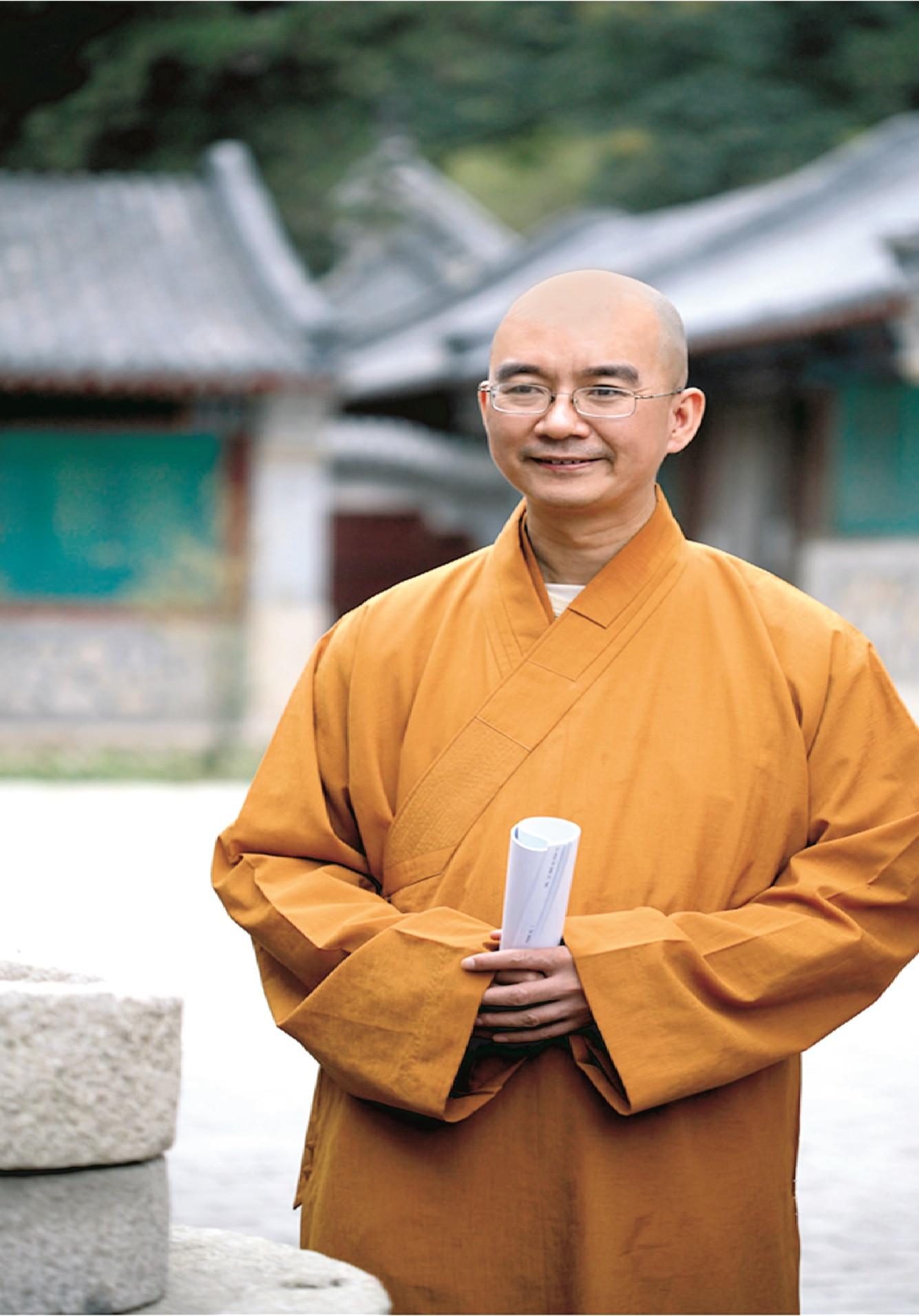 Xuecheng (cinese: 学诚; nato nel 1966) è un monaco buddista